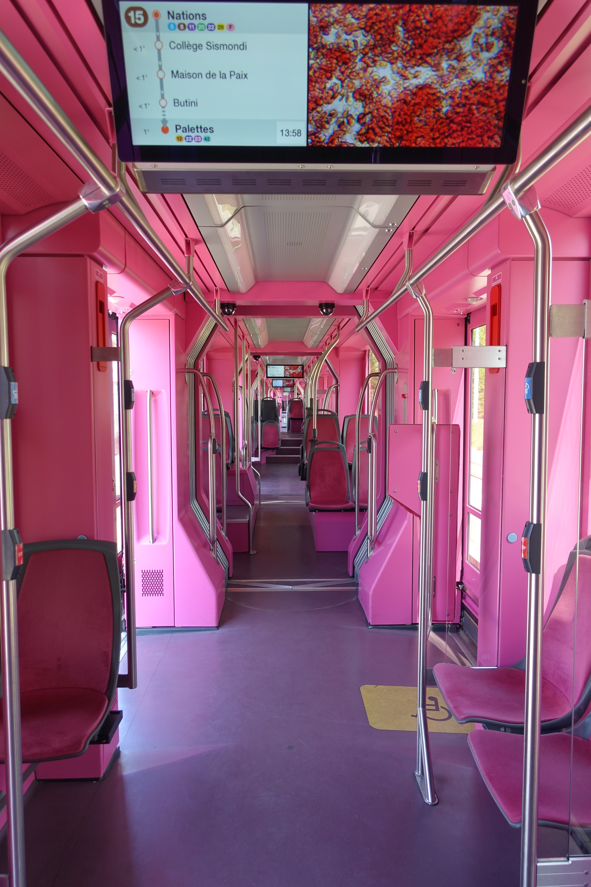 Tram rose, sur la ligne 15, terminus de la place des Nations. Il n'y a personne dans le véhicule (hormis le photographe), qui était déjà vide à la rue de Lausanne (arrêt Butini).